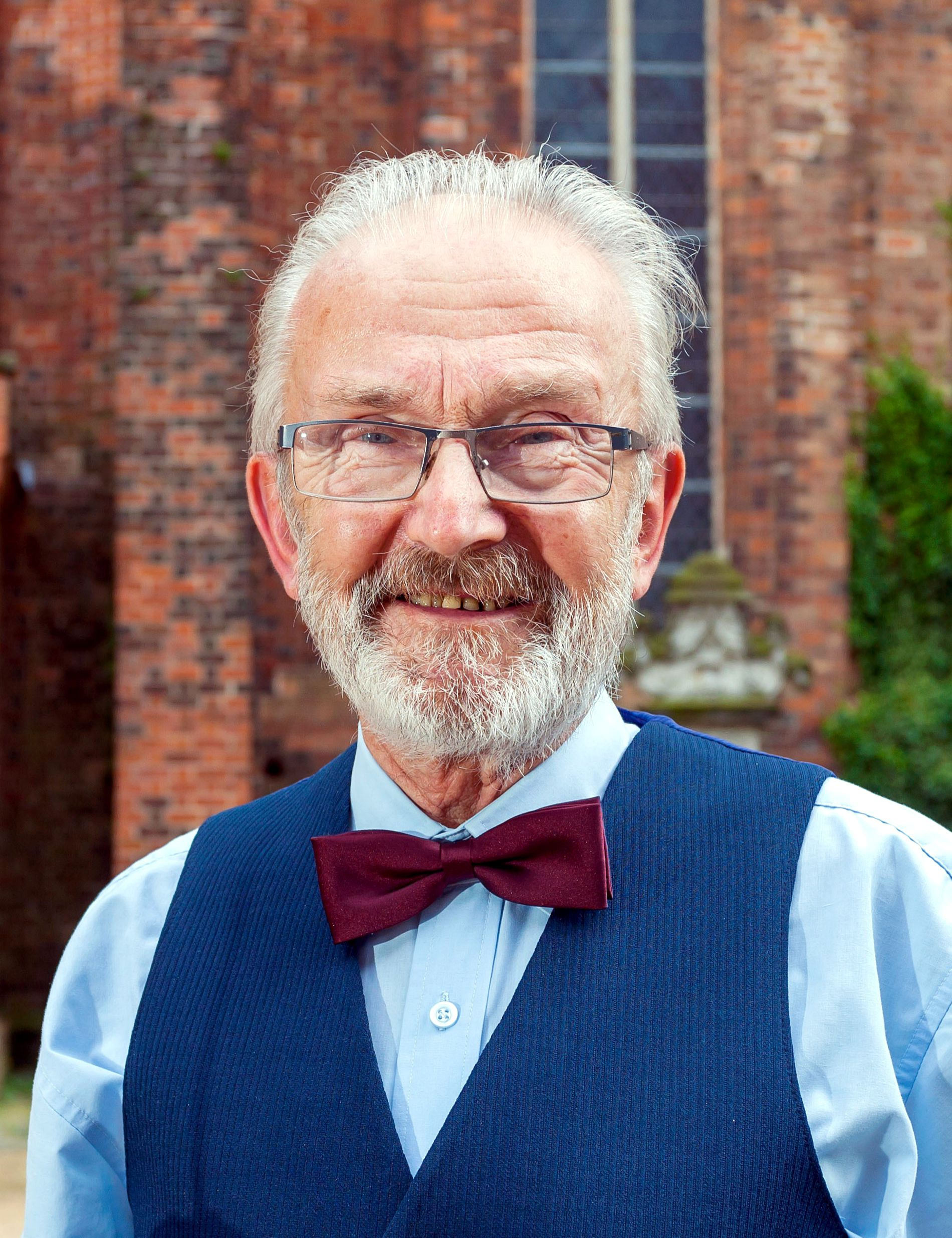 Horst Gutsche (Herzberg), 2016, Porträtausschnitt von AF_Herzberg_87220.jpg